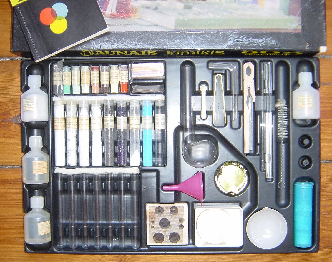 Inhalt des Chemiebaukastens -Der Junge Chemiker- von REAHIM, grosse Ausführung